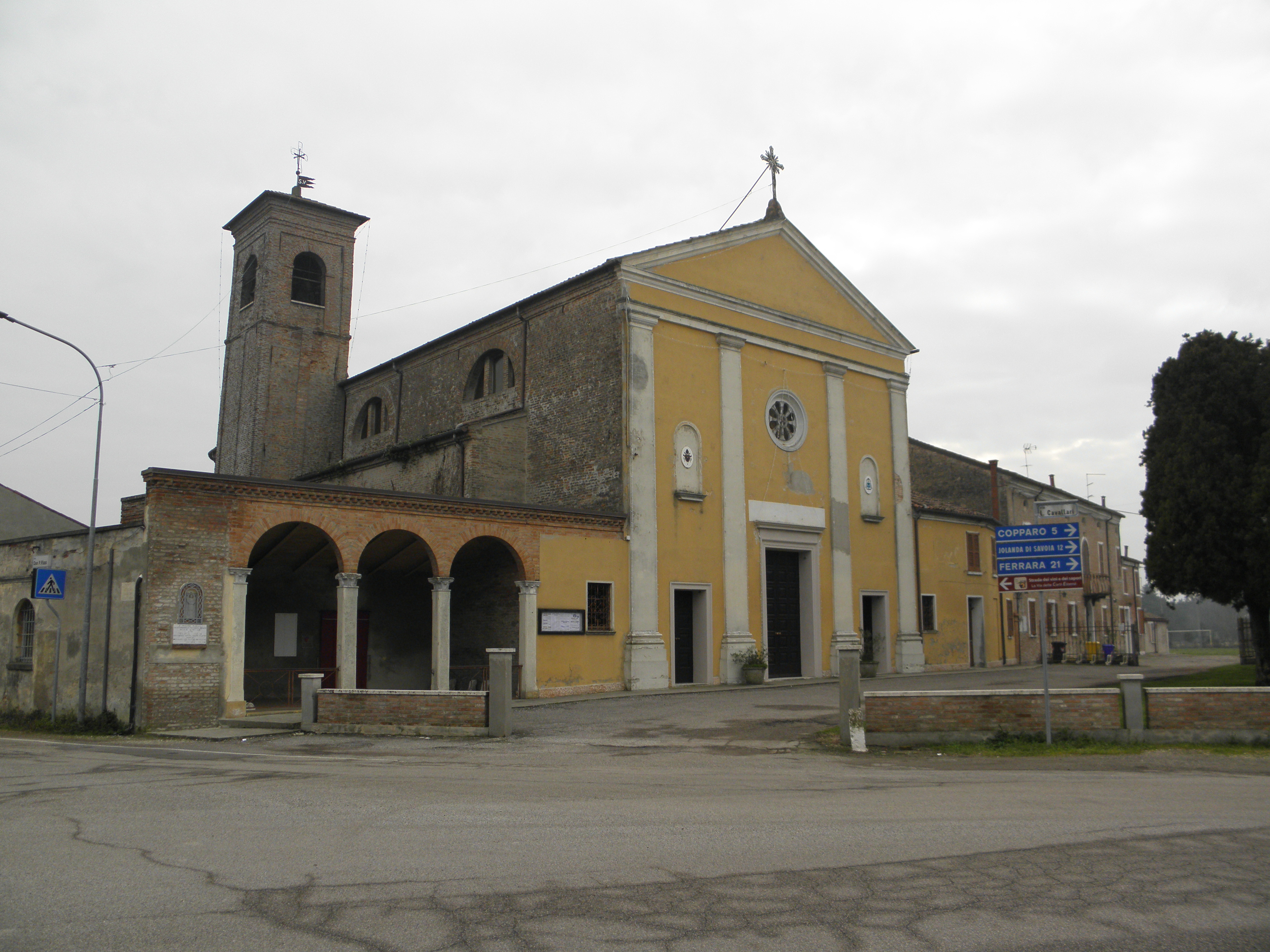 Coccanile, frazione di Copparo: la chiesa parrocchiale di San Venazio in Coccanile.